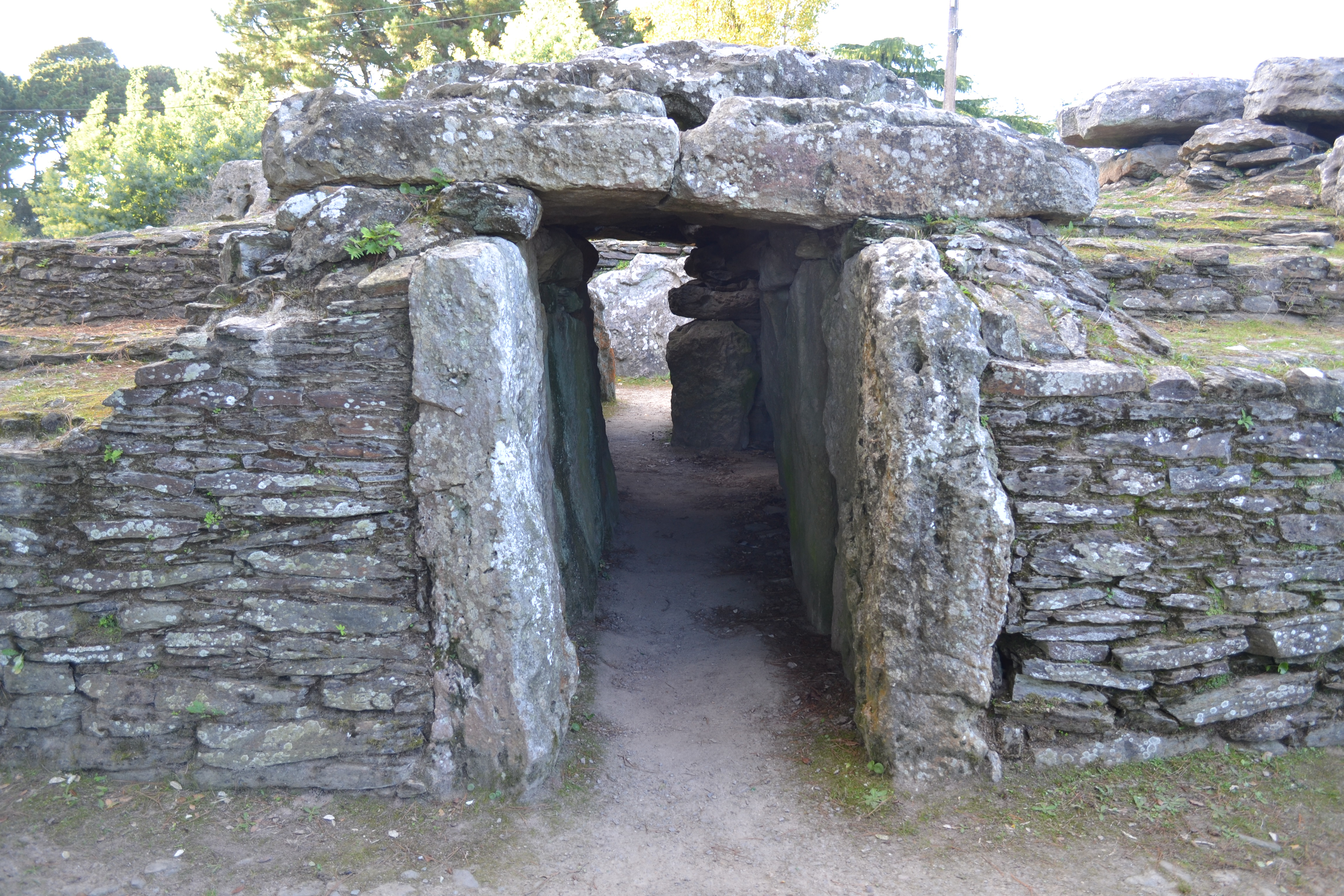 Entrée de la tombe A, Tumulus des Mousseaux, Pornic